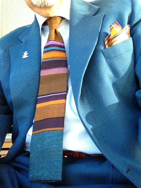 14 april 1954 tllverkade skräddaren Gunnar Hultberg, Stockholm, Sweden denna kostym i en fantastiskt vacker blå färg. Jag fann den hos vintagebutiken A.Marchesan i Stockholm 2012. Slipsen tillverkad av Siljan a 1960.